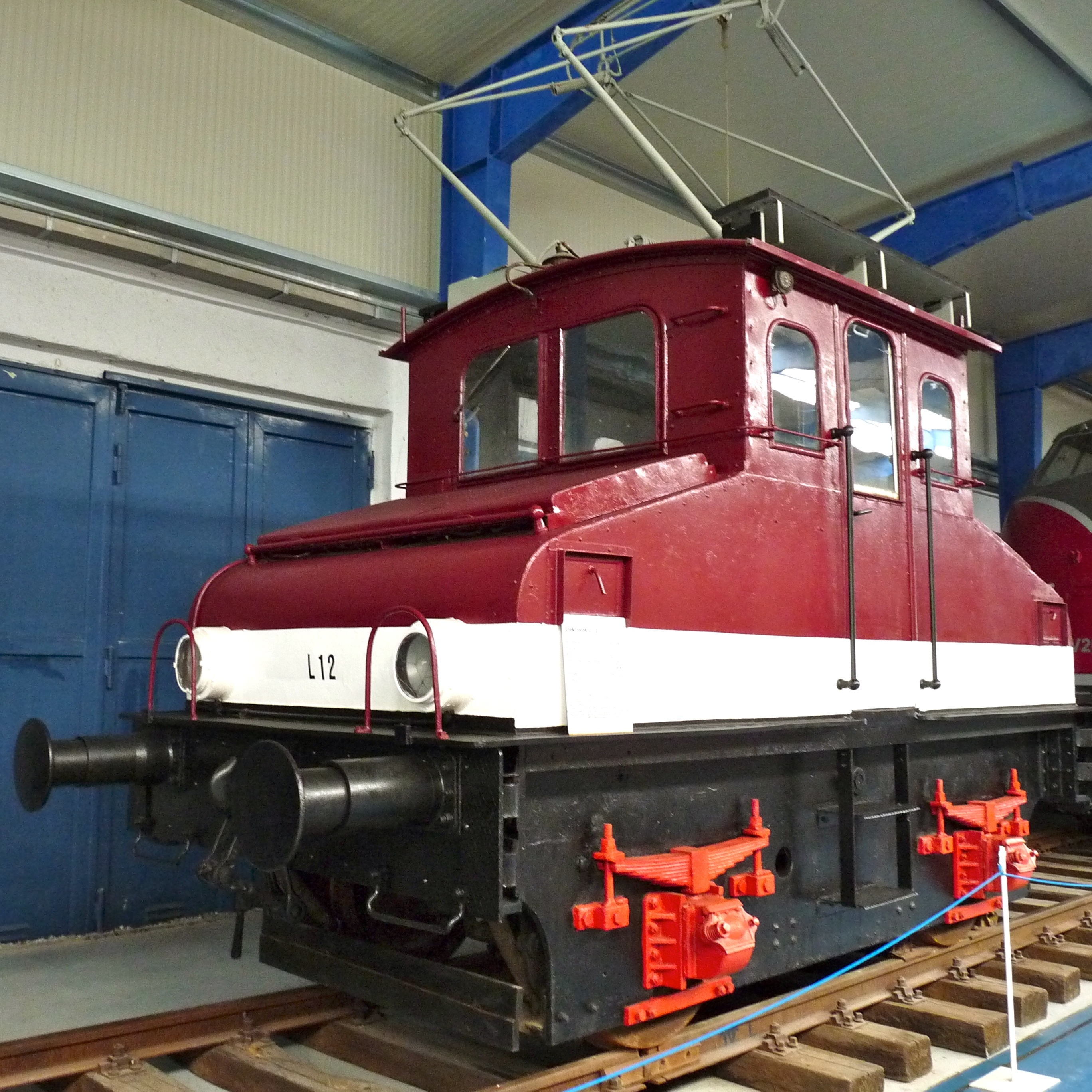 Elektrolok L12 (gebaut 1914 von AEG Berlin) im Technikmuseum Prora.